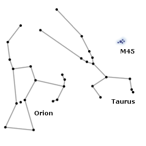 Carte schématique du ciel, permettant de trouver facilement M45 à l'œil nu.